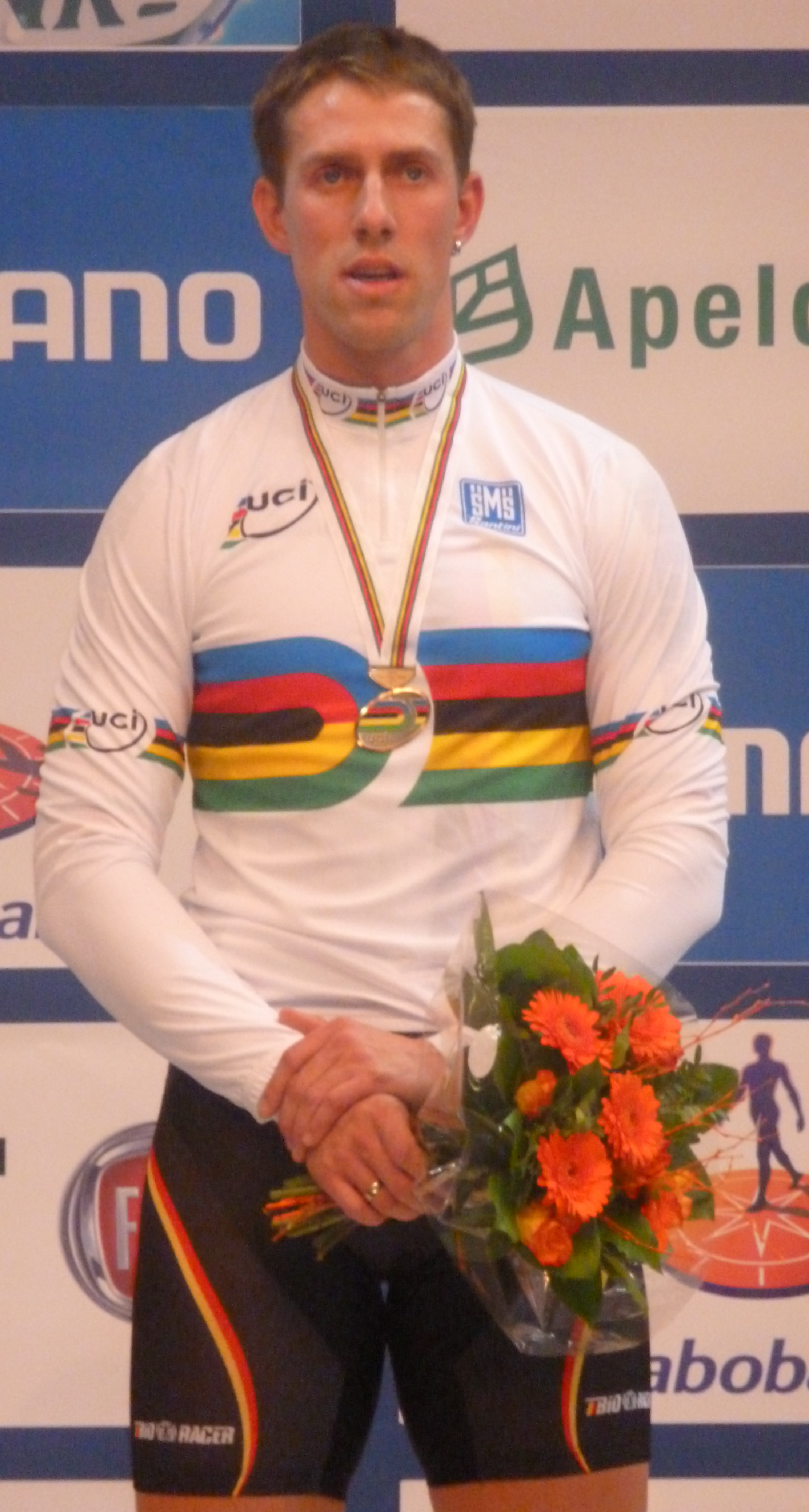 Stefan Nimke, deutscher Bahnradsportler, Bahn-WM 2011 in Apeldoorn, Goldmedaille im Zeitfahren